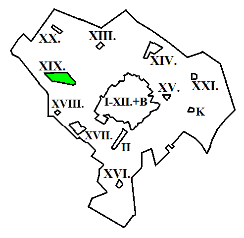 Kecskemét XIV. kerülete a térképen (Hetényegyháza)